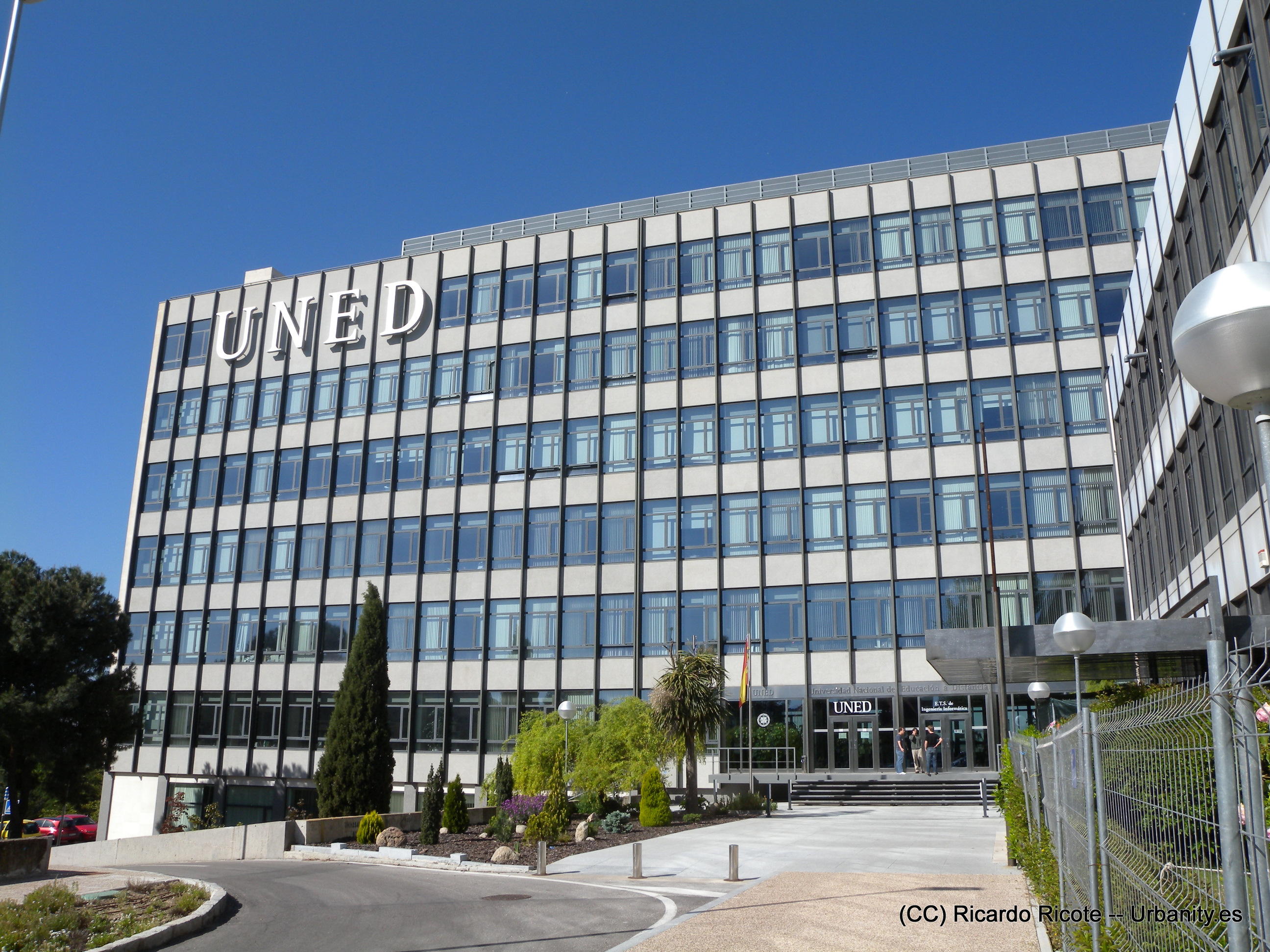 Fotografía de la ETSI Informática UNED (Madrid)